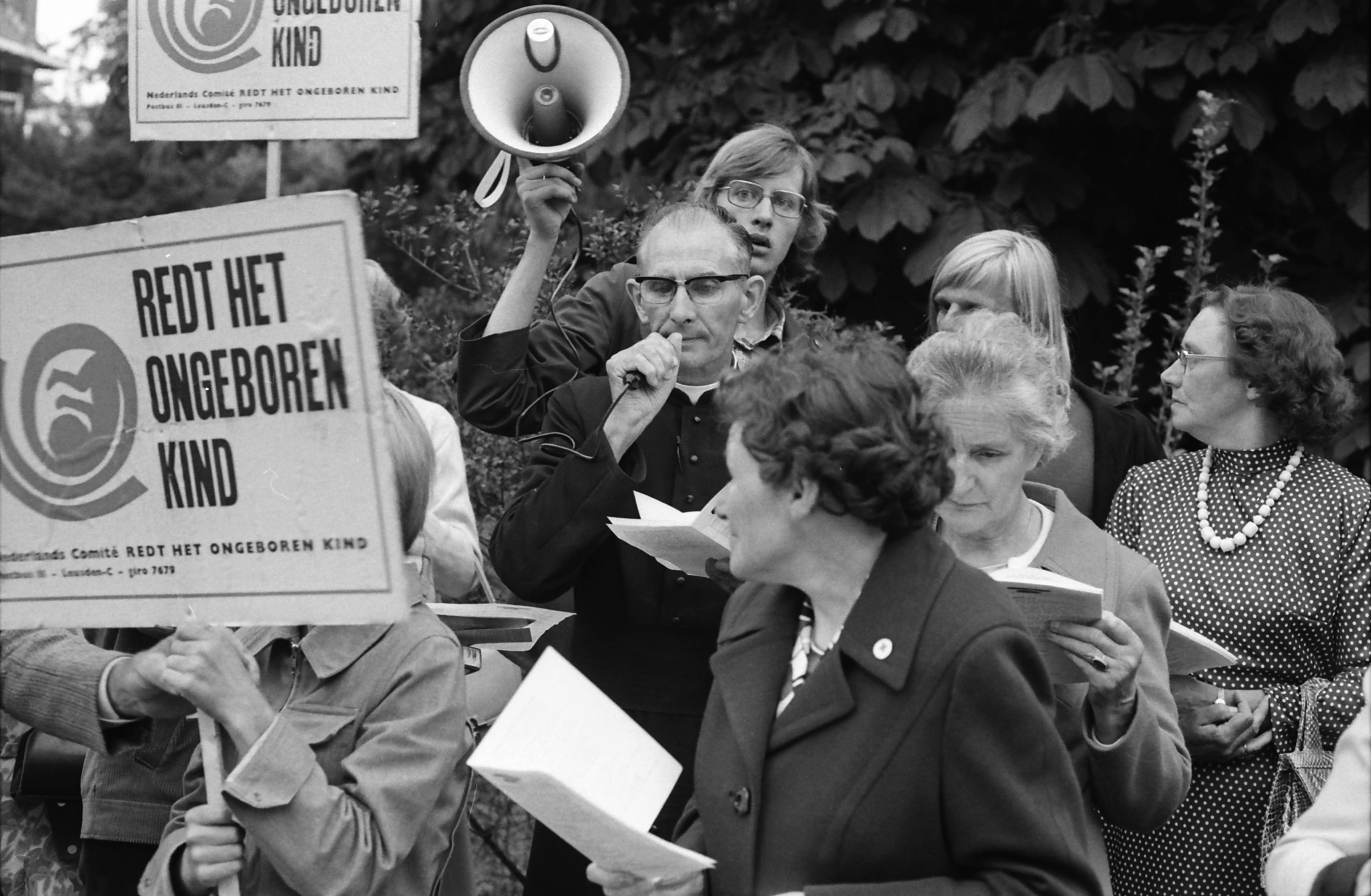 Inventarisnummer NL-HlmNHA_1478_14670 K_08 This image is created by Fotoburo de Boer made available by the Noord-Hollands Archief. This collection has been transfered to this regional archive including the copyright. While the photograph is licensed under a cc-zero license the following credit would be appreciated: "Noord-Hollands Archief / Fotoburo de Boer" English | Nederlands | +/− This file is made available under the Creative Commons CC0 1.0 Universal Public Domain Dedication.The person who associated a work with this deed has dedicated the work to the public domain by waiving all of his or her rights to the work worldwide under copyright law, including all related and neighboring rights, to the extent allowed by law. You can copy, modify, distribute and perform the work, even for commercial purposes, all without asking permission.